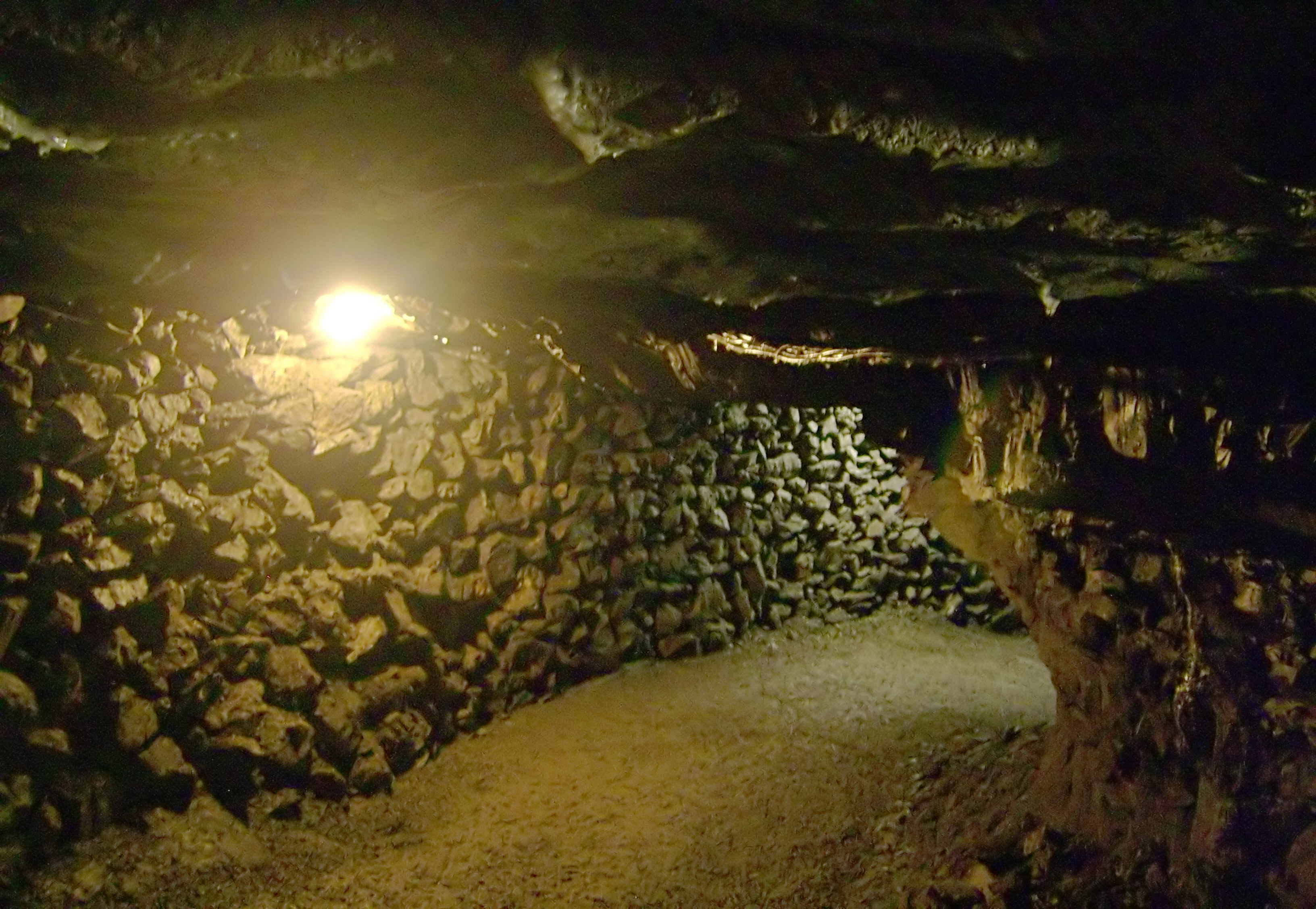 Kalksteinbergwerk Wolfstein